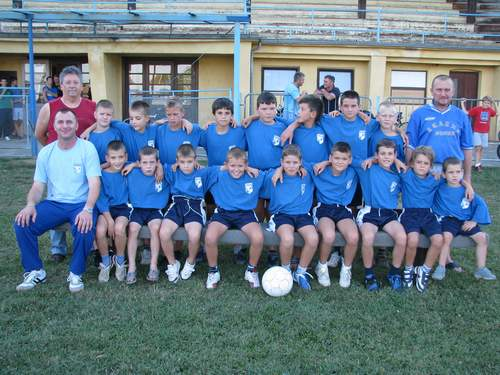 nogometni klub ŠNK Baranja-Belje, Beli Manastir